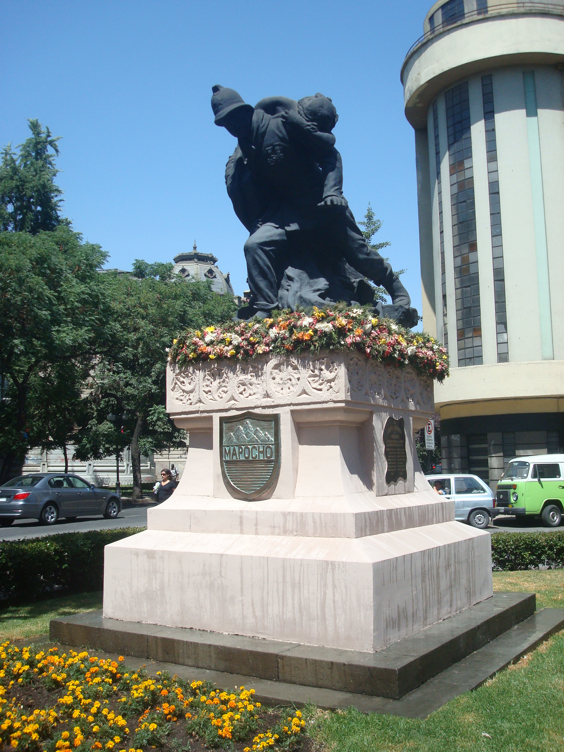 Monumento al Cuerpo de Bomberos de Santiago, Chile